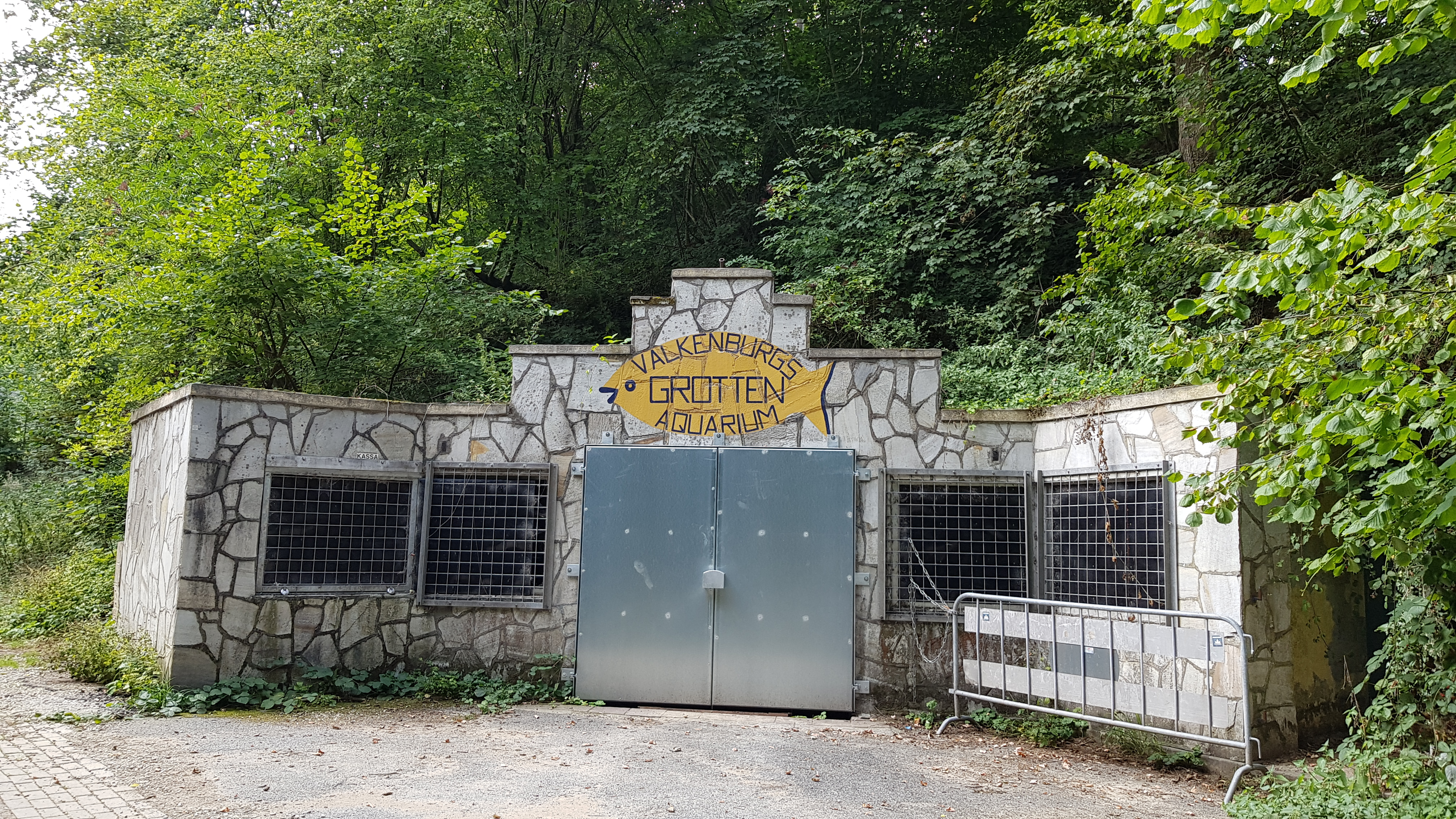 ingang Trichterberggroeve, Valkenburg, Nederland